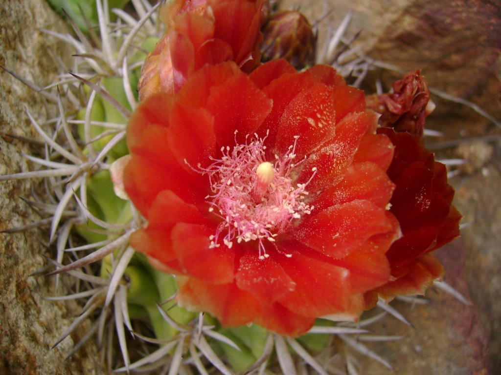 Eriosyce curvispina var. tuberisulcata